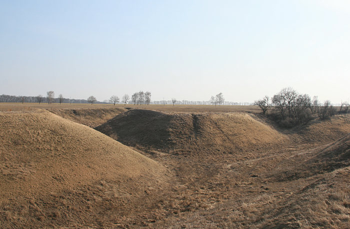 Залишки Скіфського городища в Таращанському районі: Залишки Скіфського городища в Таращанському районі